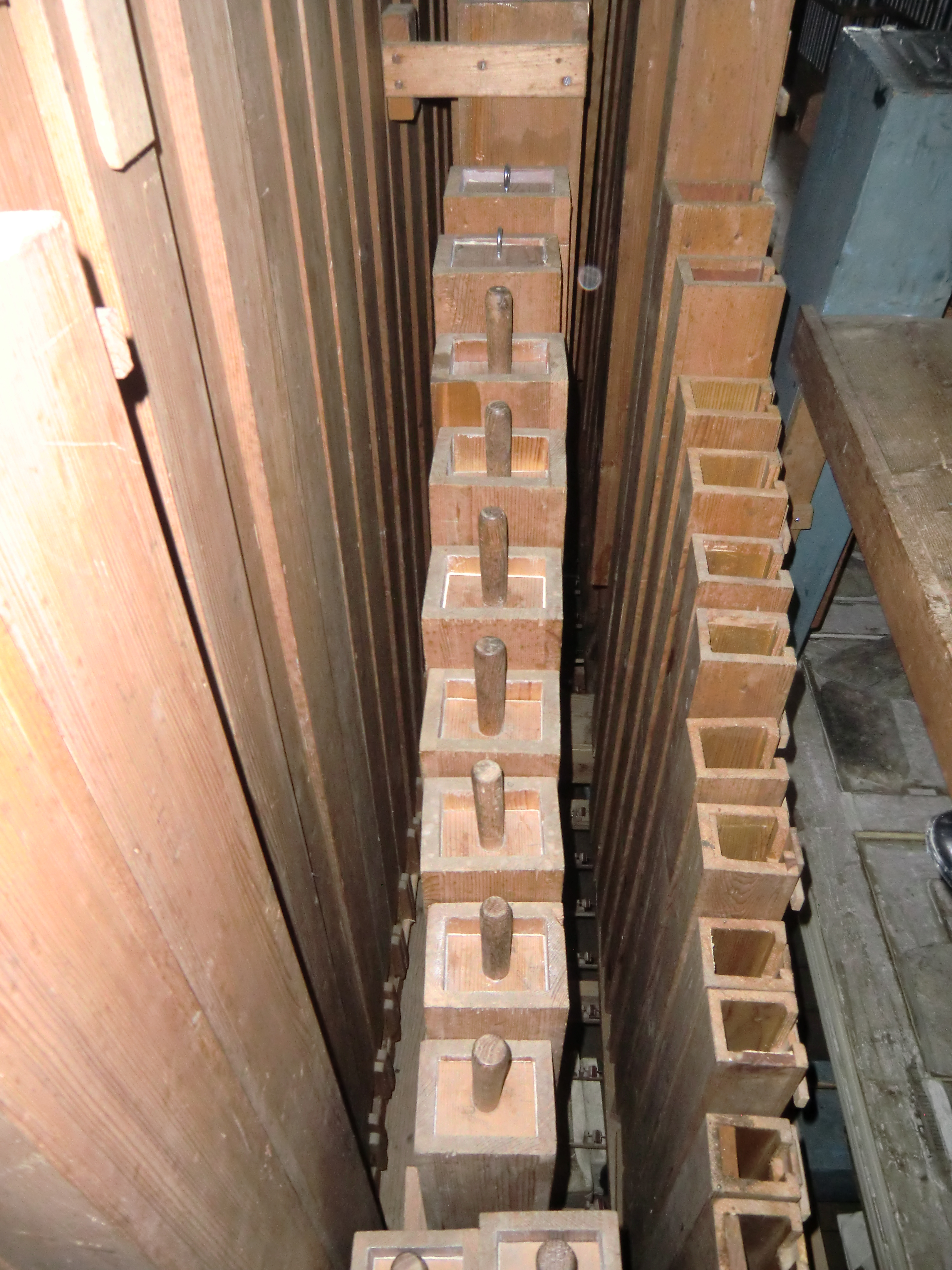 Keller-Orgel Kransberg (1876) - Pfeifenwerk ("Violonbass 16´", "Subbass 16´", "Principalbass 8´" im Pedal)